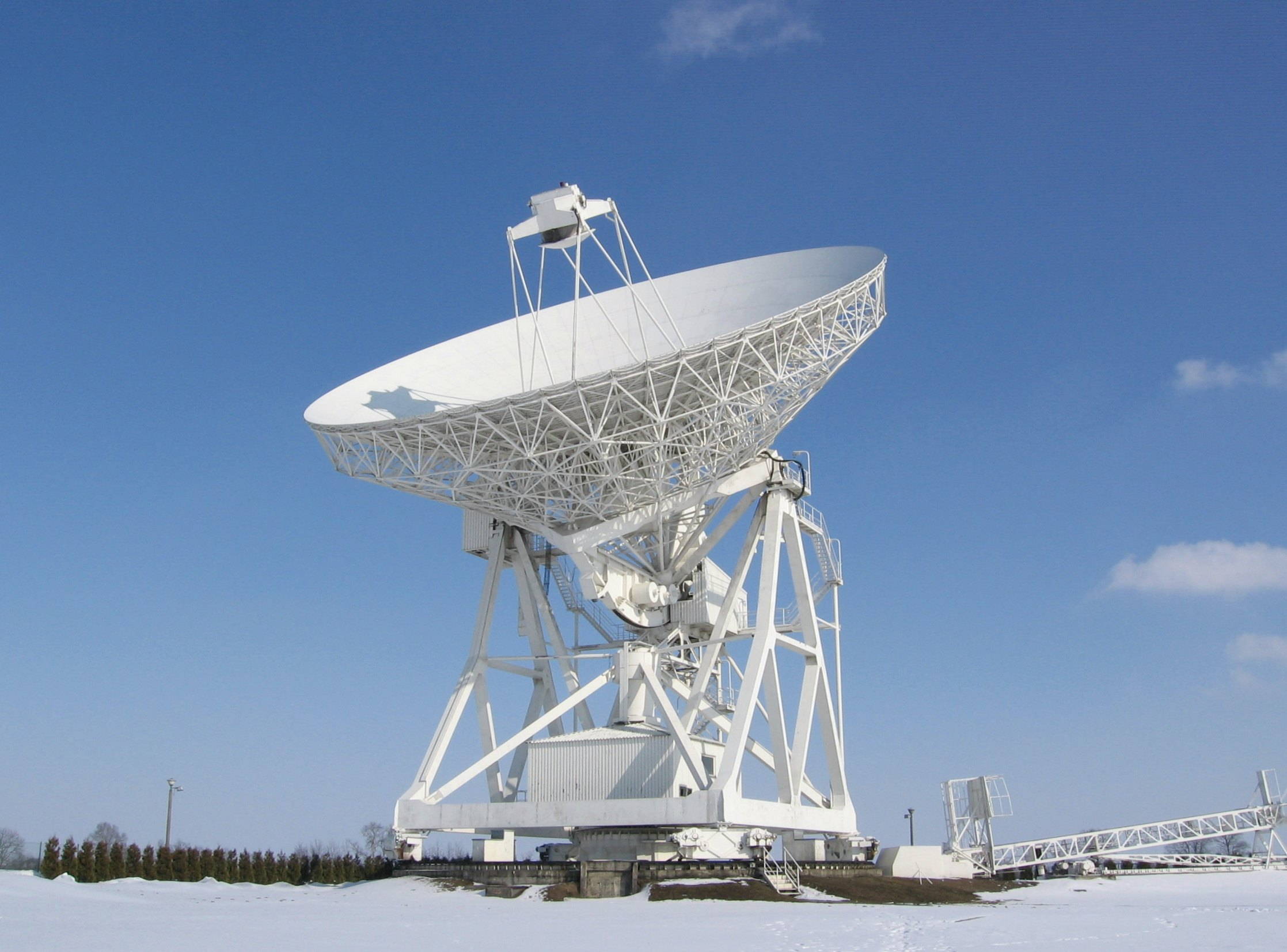 Torun 32m radiotelescope; author: Roman Feiler.